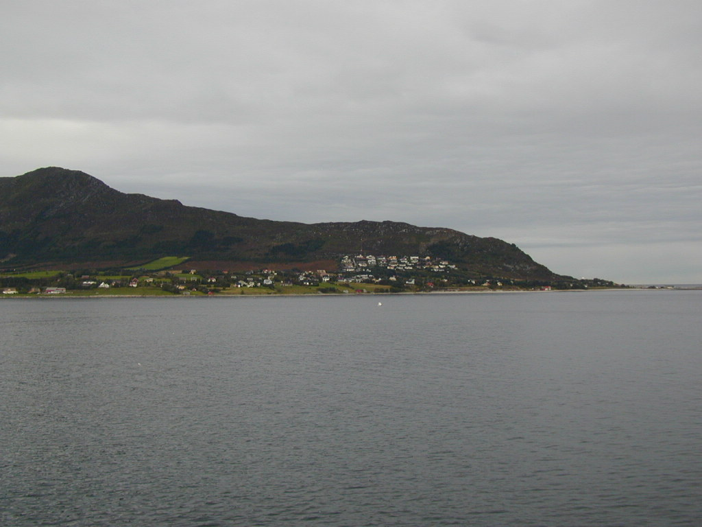 Godøya